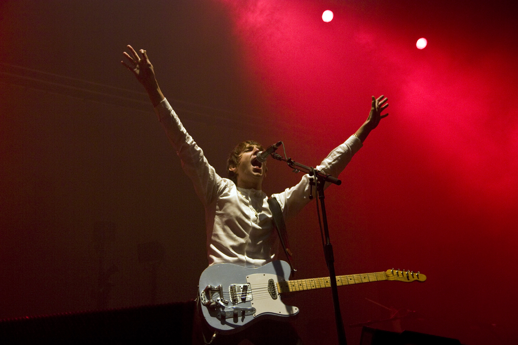 Foto: Rosario López